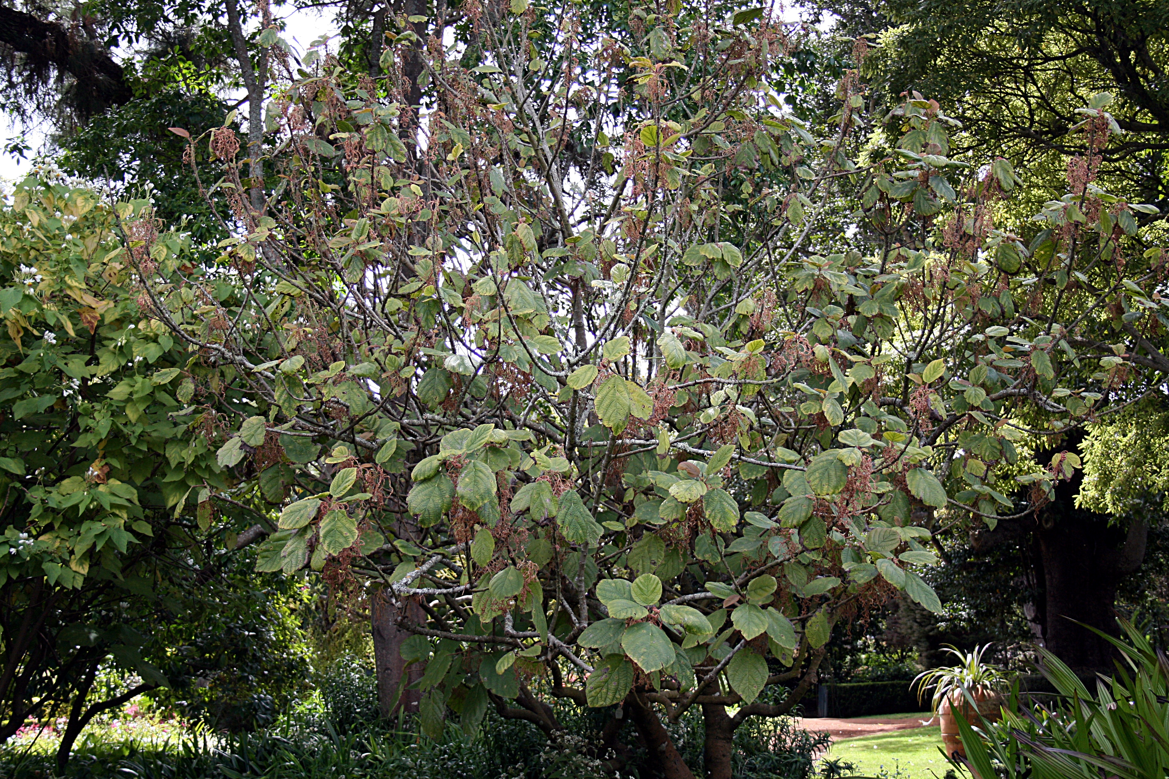 Myriocarpa longipes (misspelled in file name)